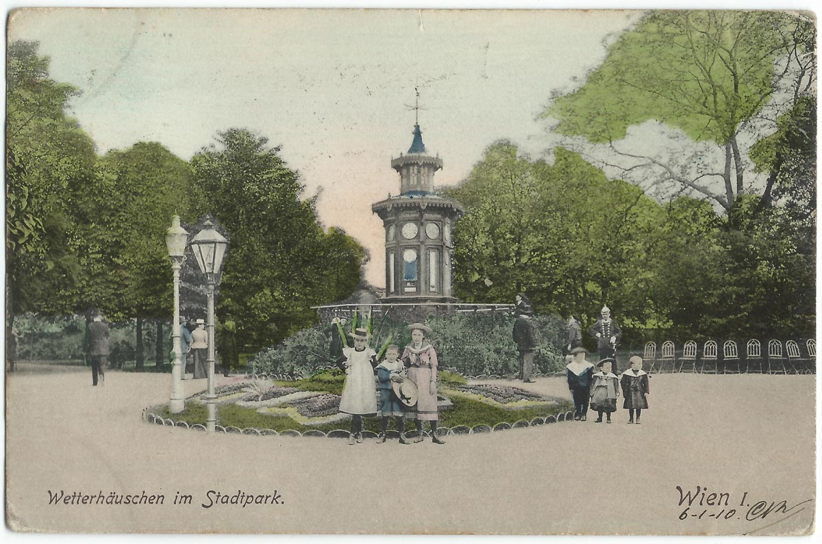 Vue de Vienne au début du XXe siècle.